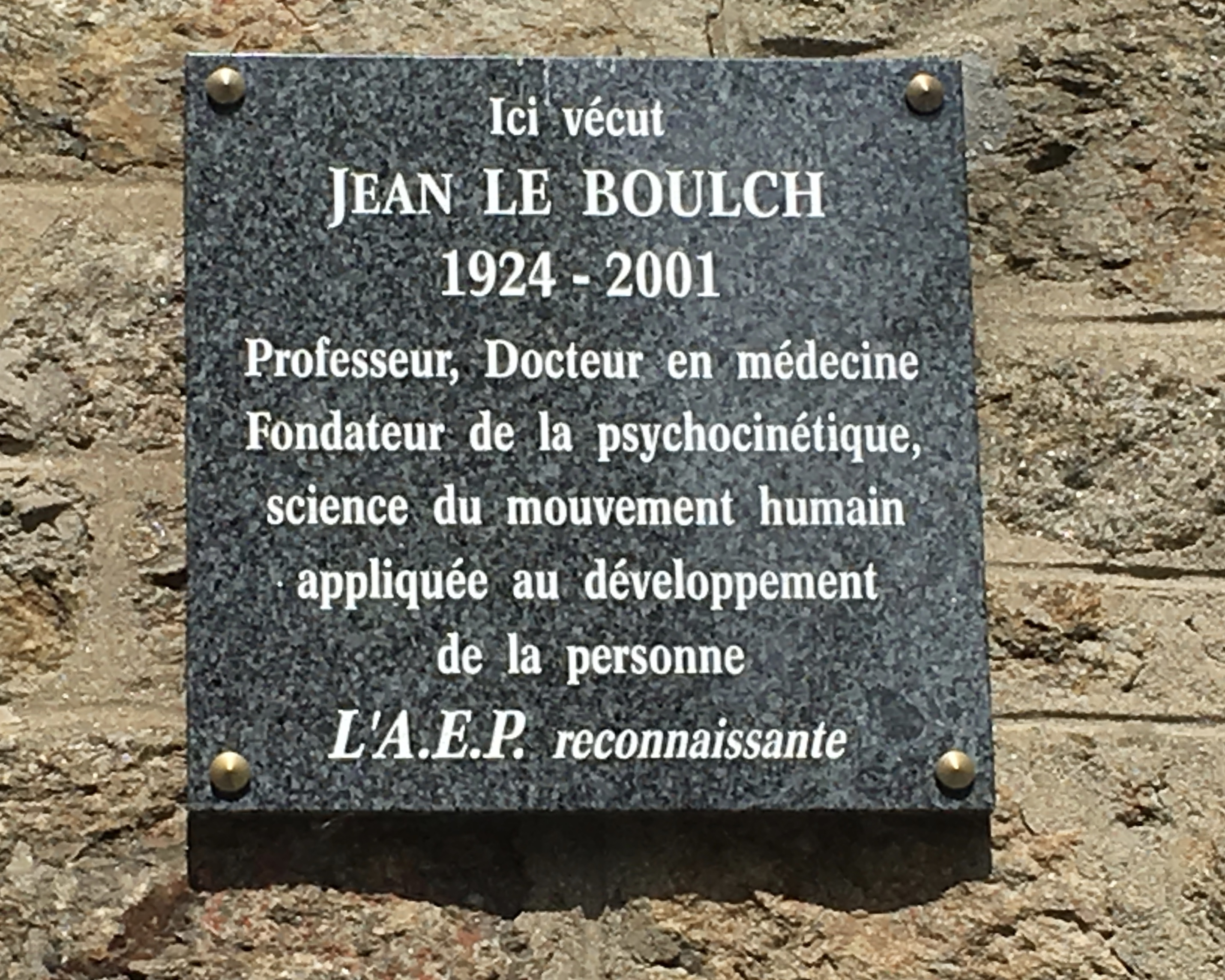 Plaque inaugurée en février 2015 conjointement par la mairie de Dinard et l'Association Européenne de Psychocinétique (A.E.P.)